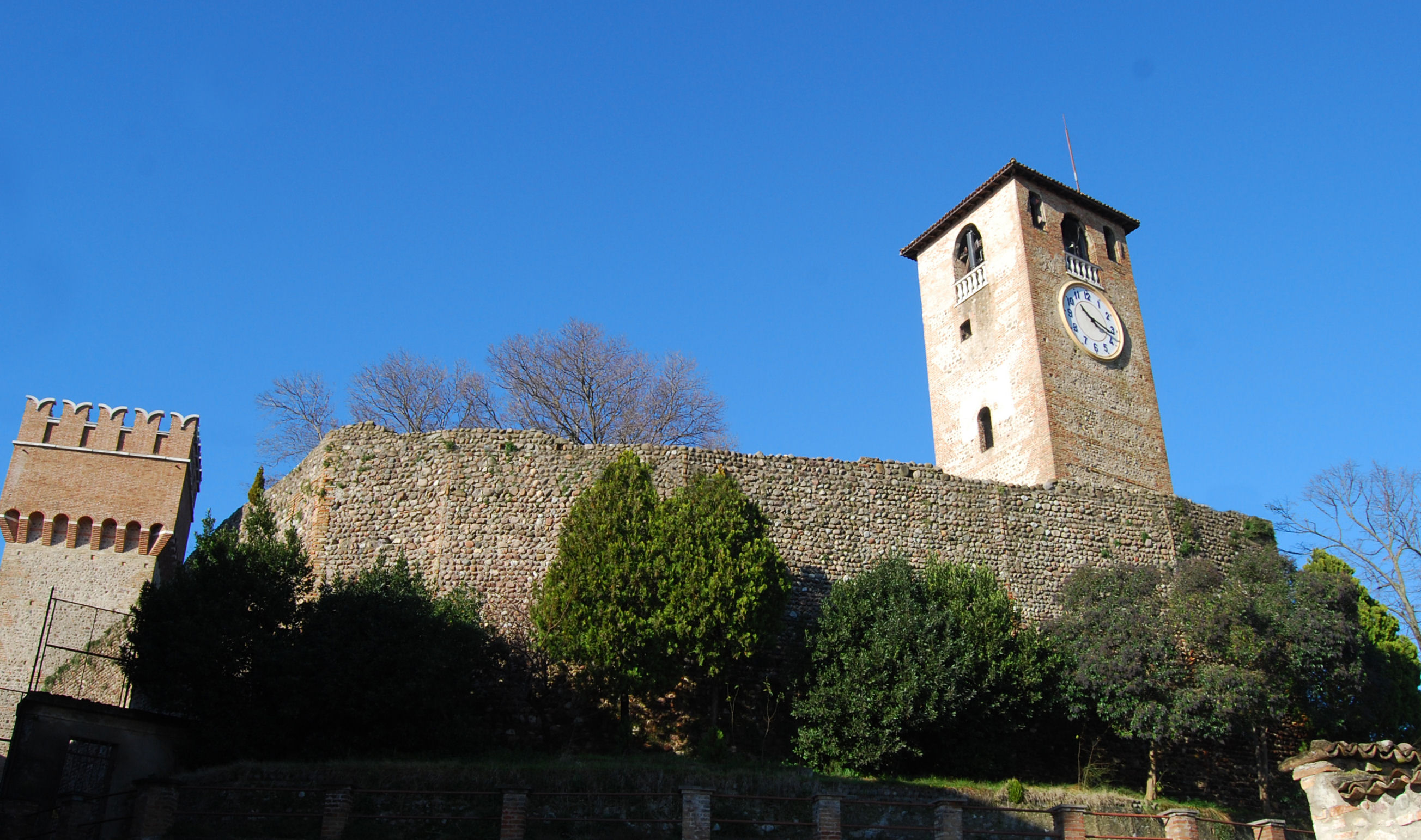 Volta Mantovana, castello.